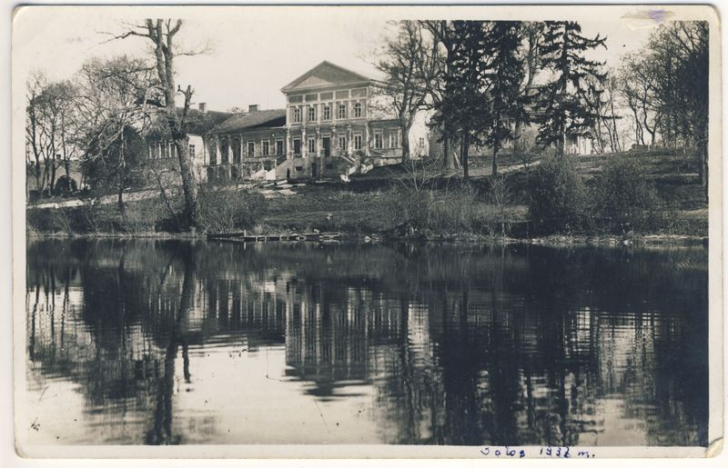 Salų dvaras. 1937 m. Nežinomas fotografas.